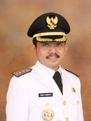 Danar Rahmanto